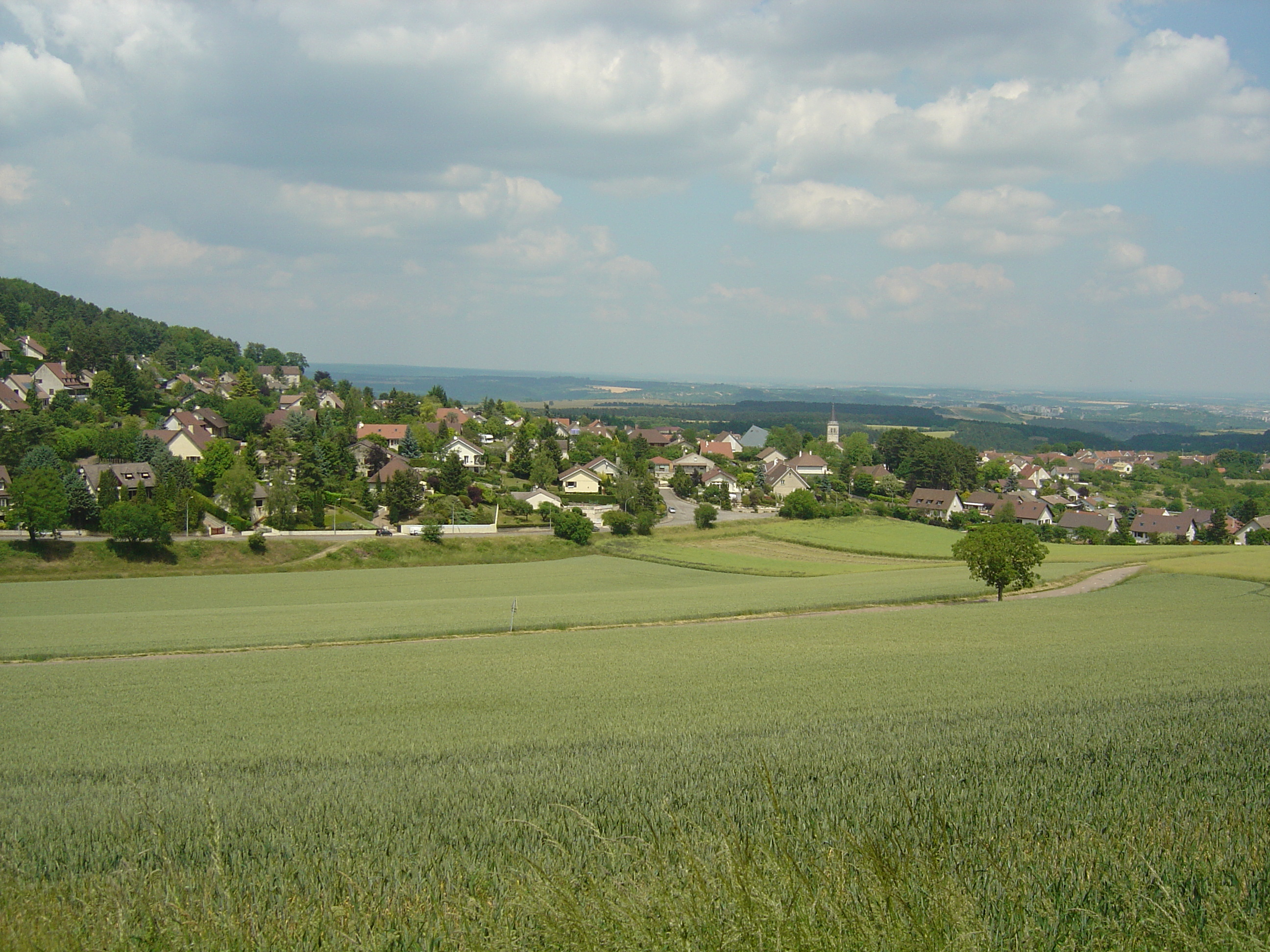 Vue générale de Corcelles-les-Monts depuis la route menant au mont Afrique (Bourgogne, 21)